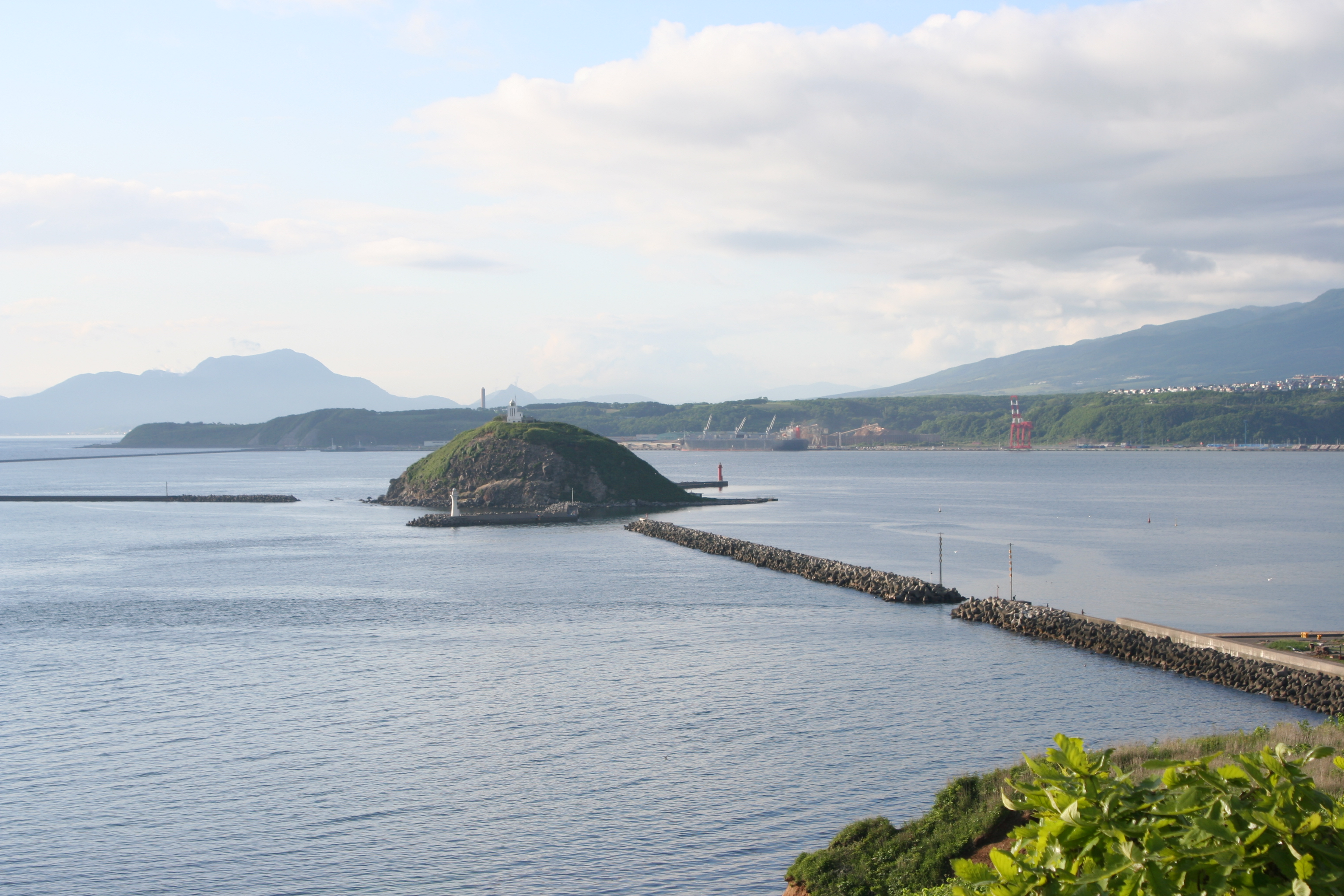 Daikoku Island,Muroran,Hokkaido,Japan（室蘭市大黒島、室蘭市で撮影）